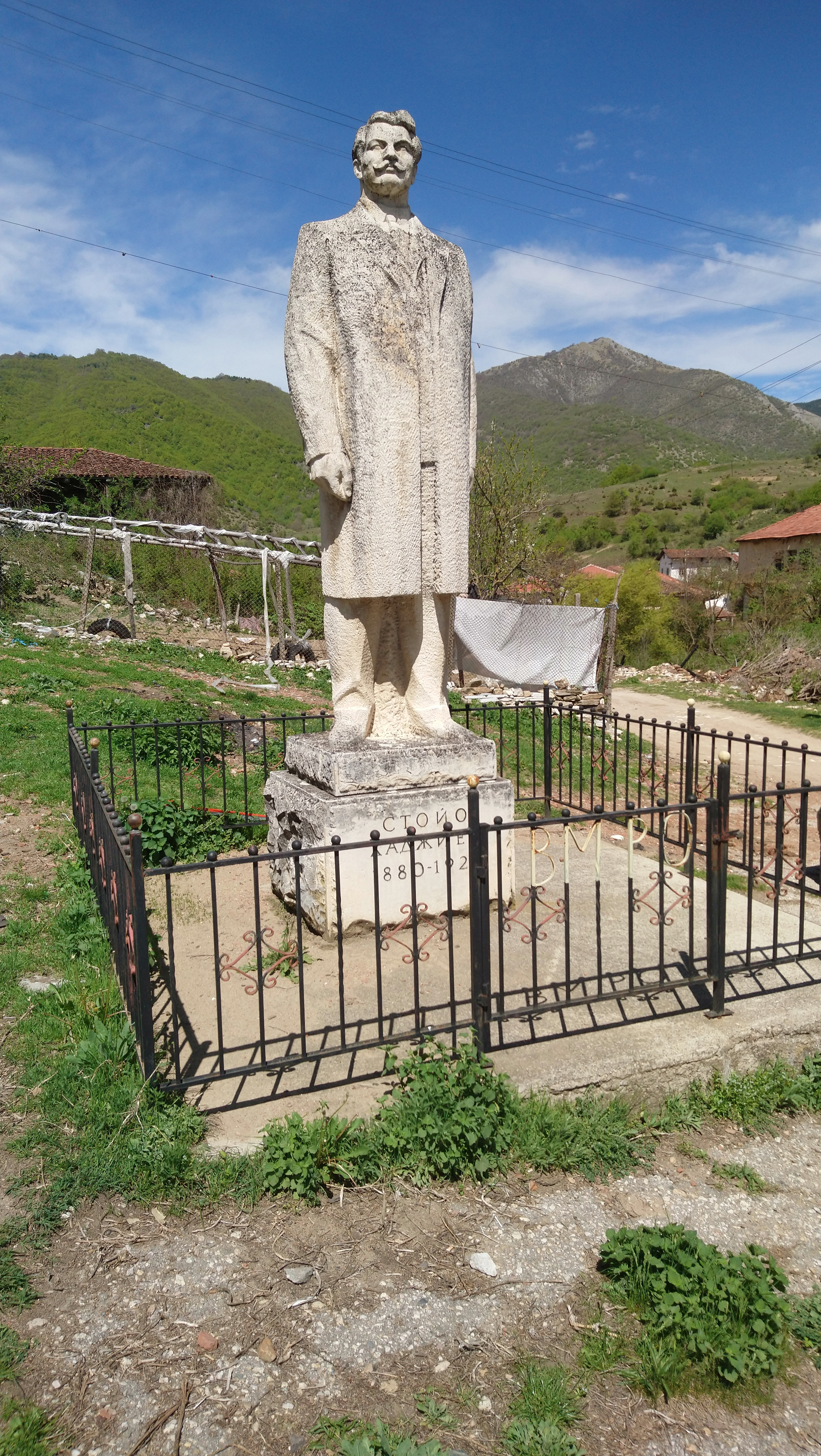 Паметник на Стойо Хаджиев в село Голешово